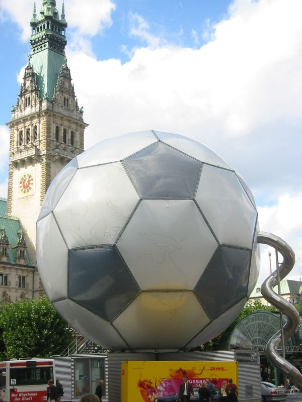 Vor dem Hamburger Rathaus: Fußball Globus zur WM 2006.